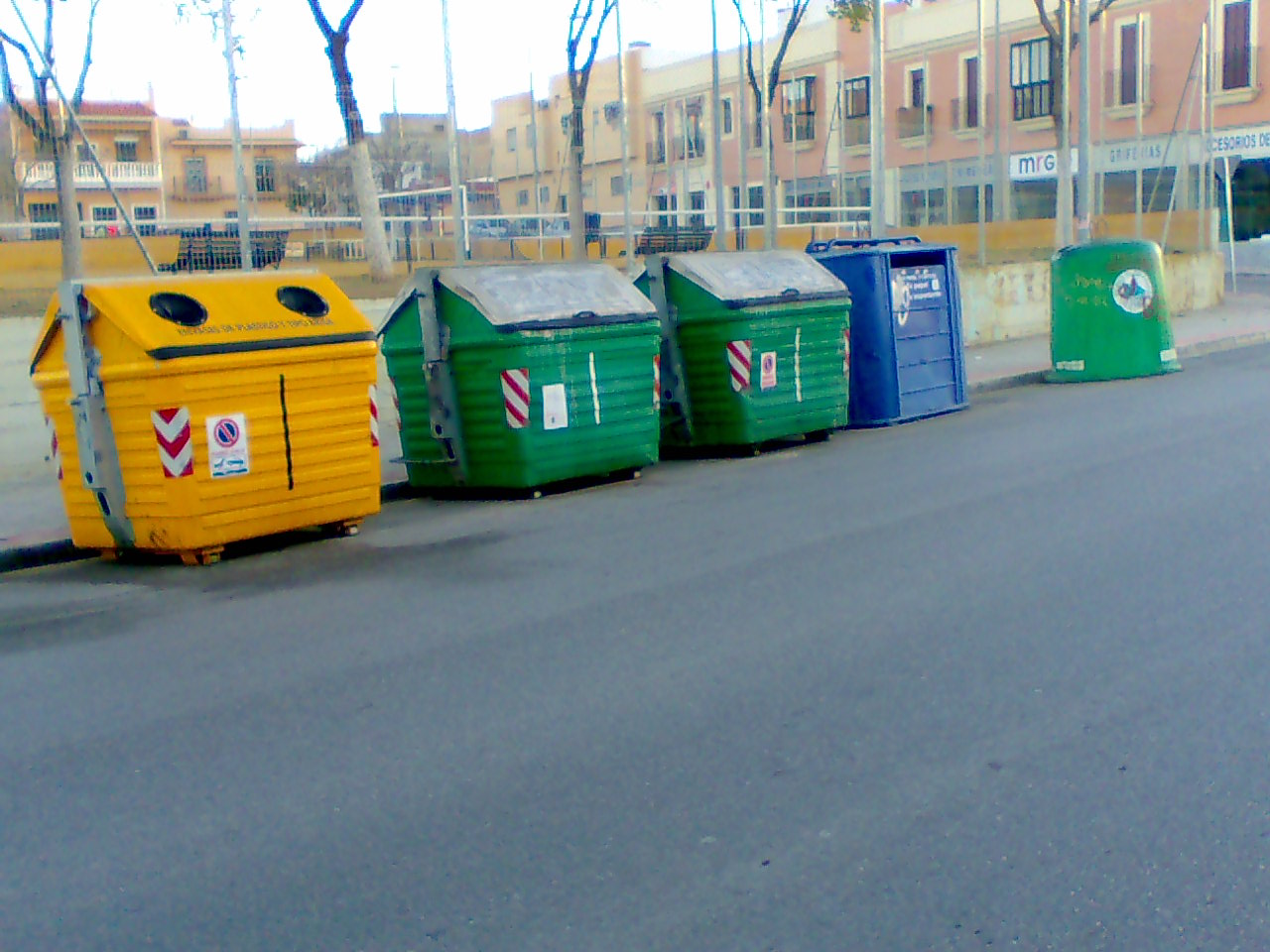 Contenedores selectivos de basuras en Dos Hermanas (Sevilla)